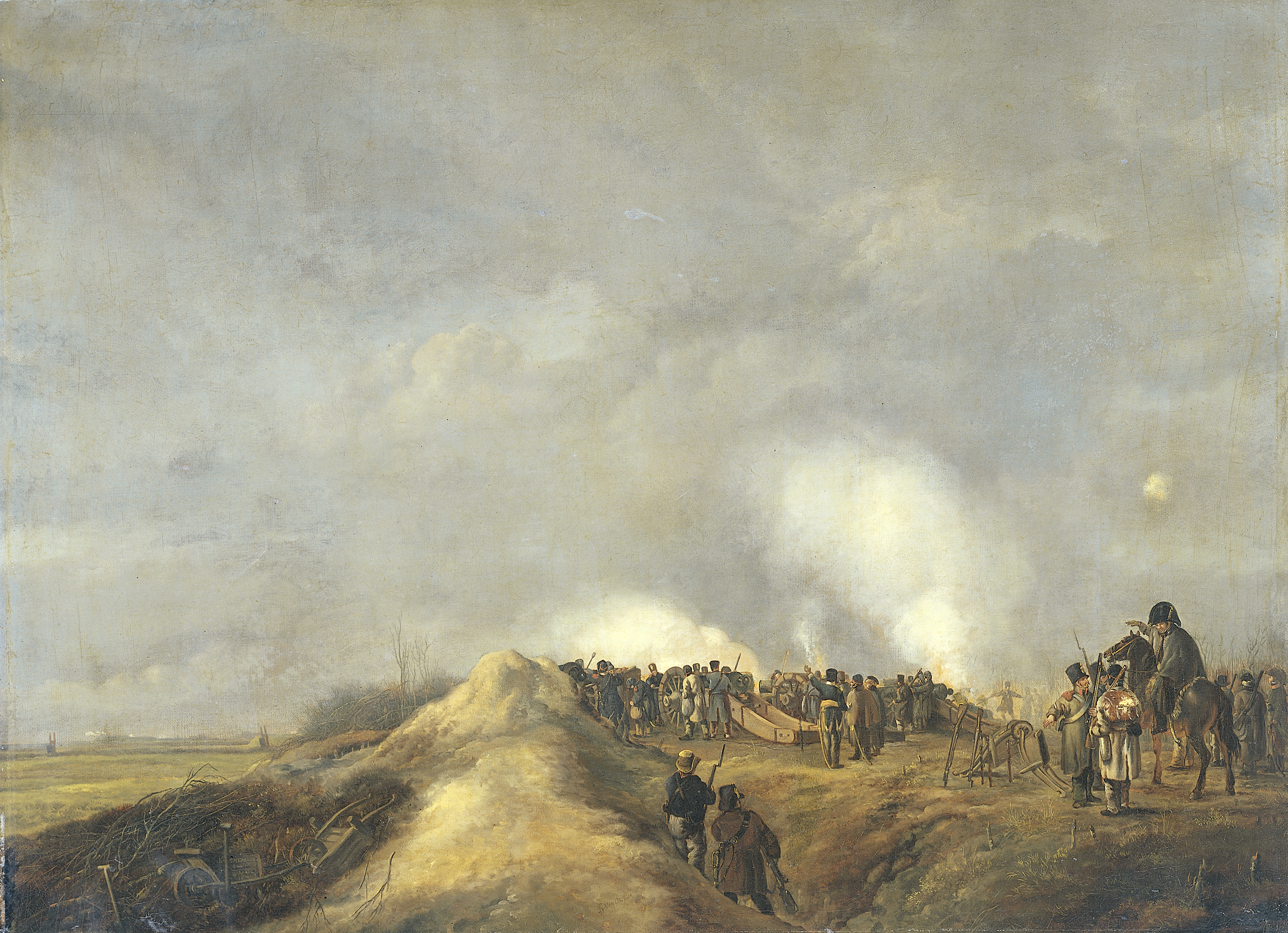 Het beschieten van Naarden, april 1814. Op een schans bij Kommerrust staan soldaten en officieren bij kanonnen waarmee op de stad Naarden geschoten wordt. Links op de helling liggen enkele kruiwagens.